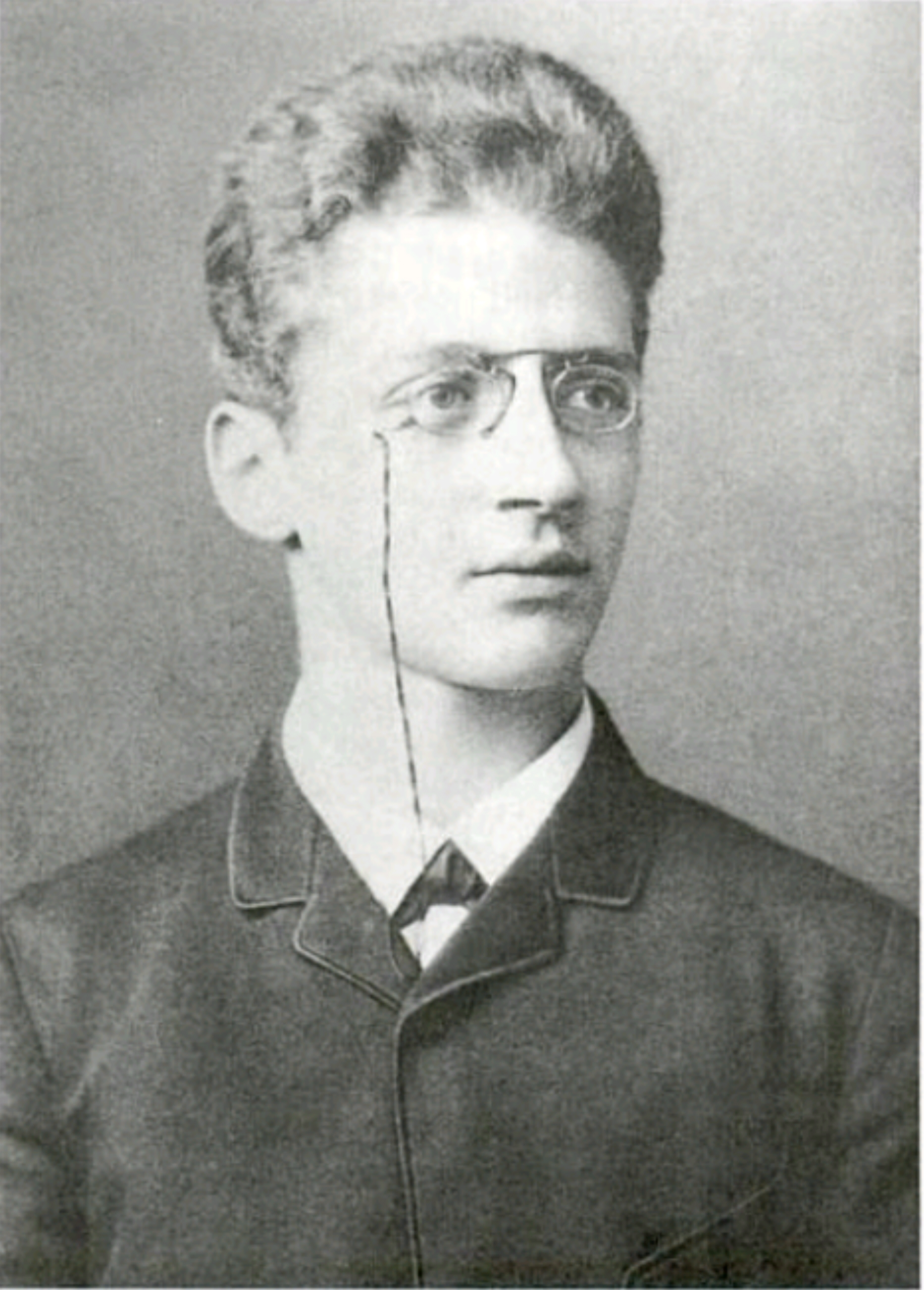 Fritz Haber (* 9. Dezember 1868 in Breslau; † 29. Januar 1934 in Basel), Promotion Berlin